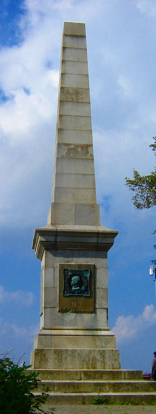 Canossasäule Bad Harzburg